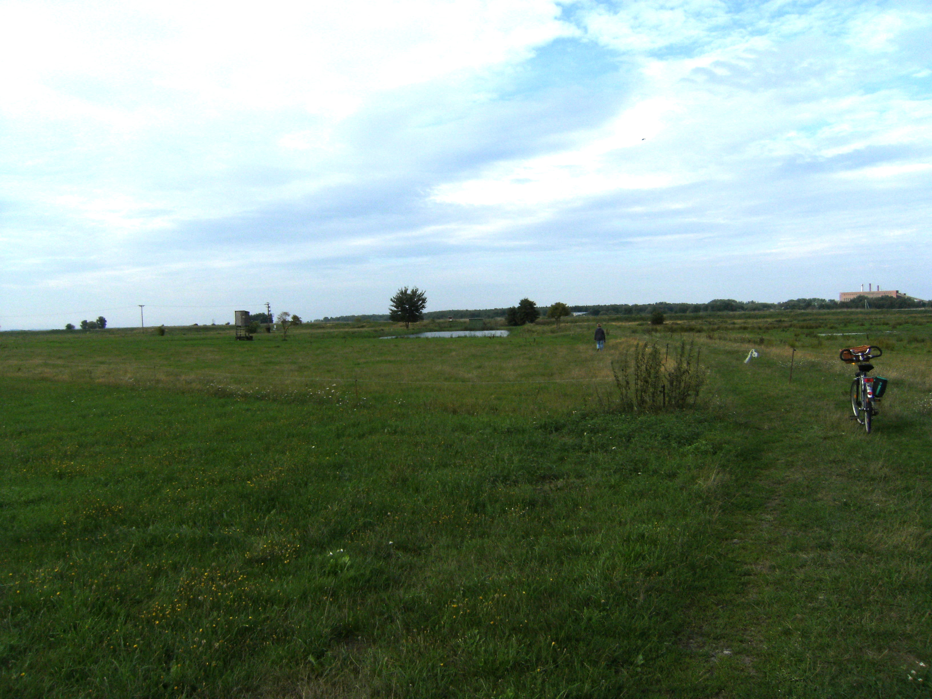 Blick von Kröslin zur Wüstung Grünschwade